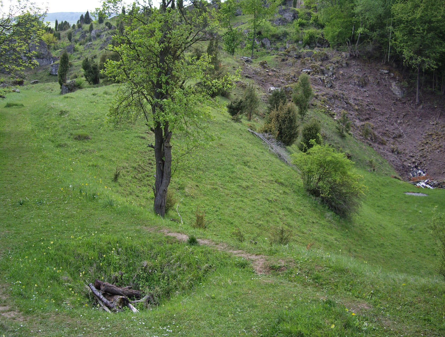 Hielöcher bei Frankershausen, Hessen, Mai 2010. Foto: F. Welter-Schultes